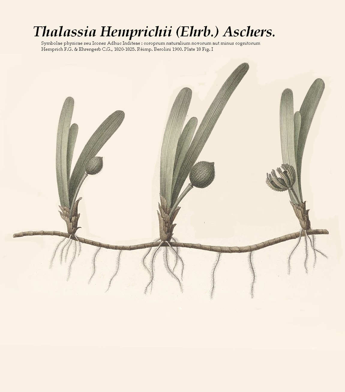 Thalassia Hemprichii (Ehrb.) Aschers. ex Shizotheca Hemprichii